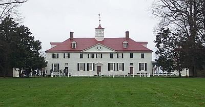 en: A villa at Mount Vernon.